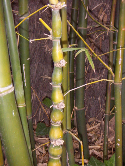 Bambusa ventricosa Autor:Jordi Coll Costa 10:41, 14 May 2005 (UTC)